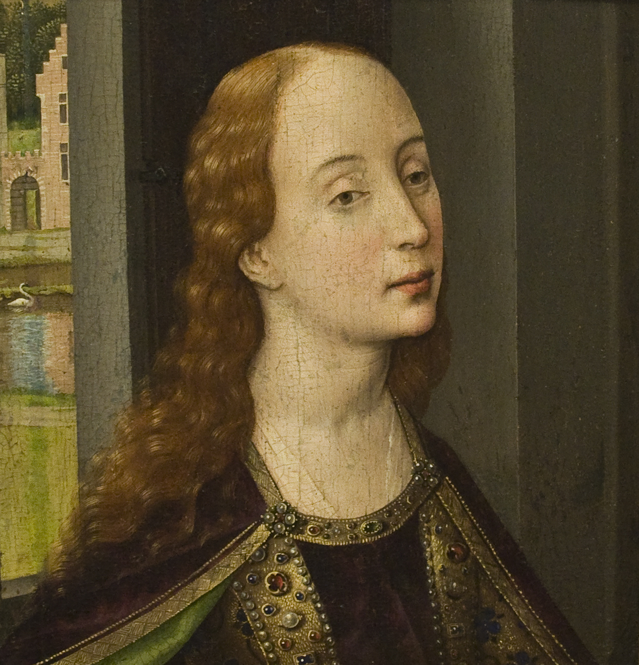 deel van een groter doek van van der Weyden, zie Maria Magdalena leest